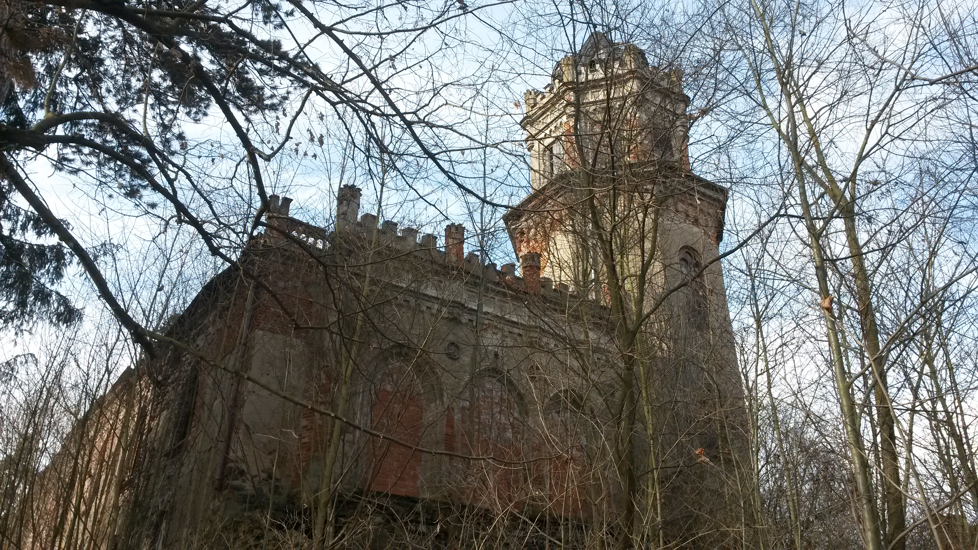 Veselí (zámek)